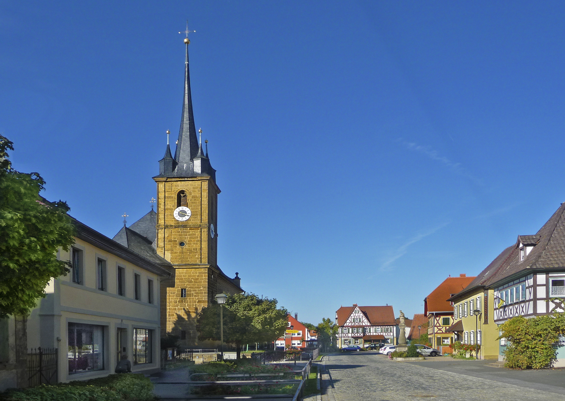 Kleukheim